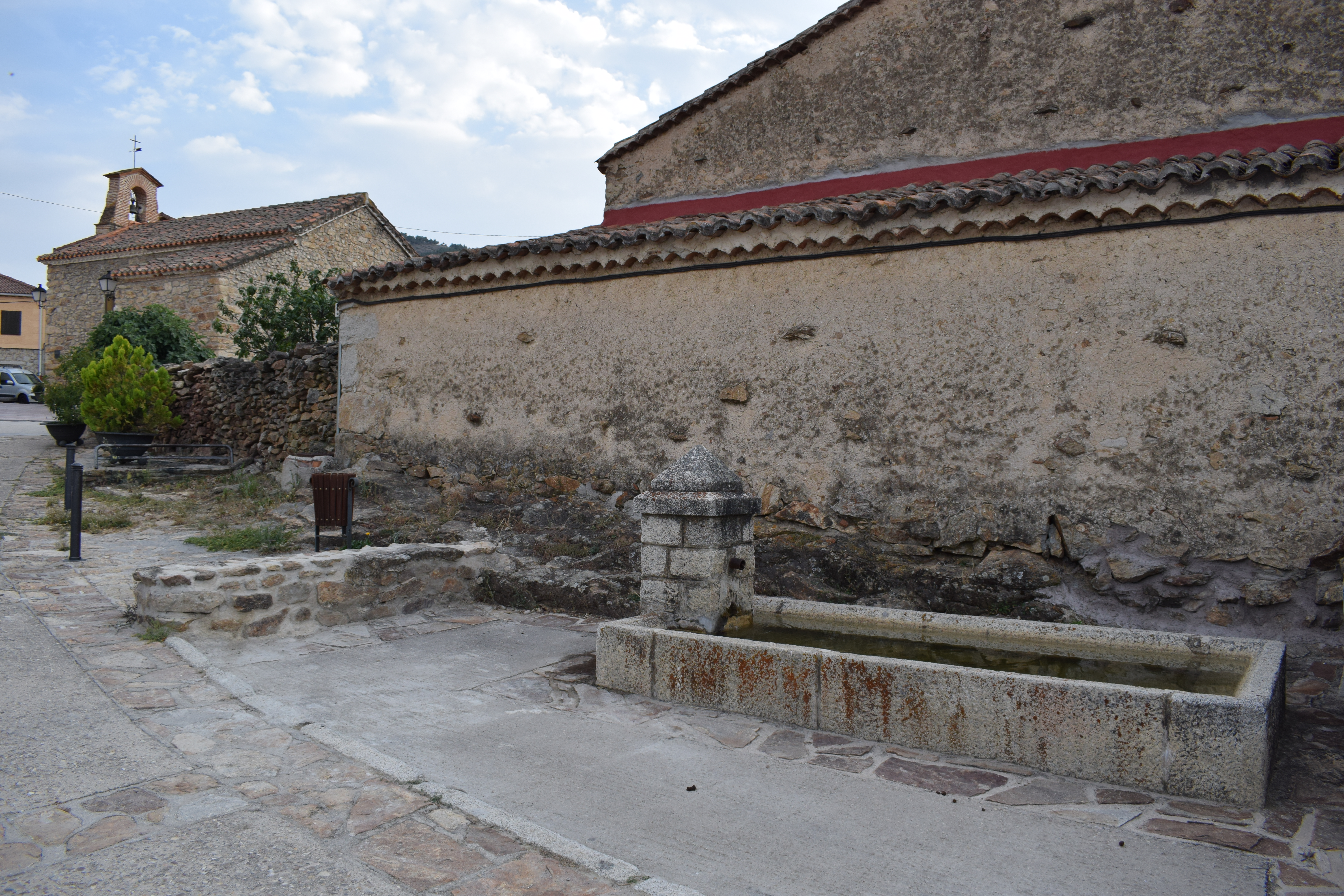 El Pilon de Arriba, El Cuadron (Madrid)